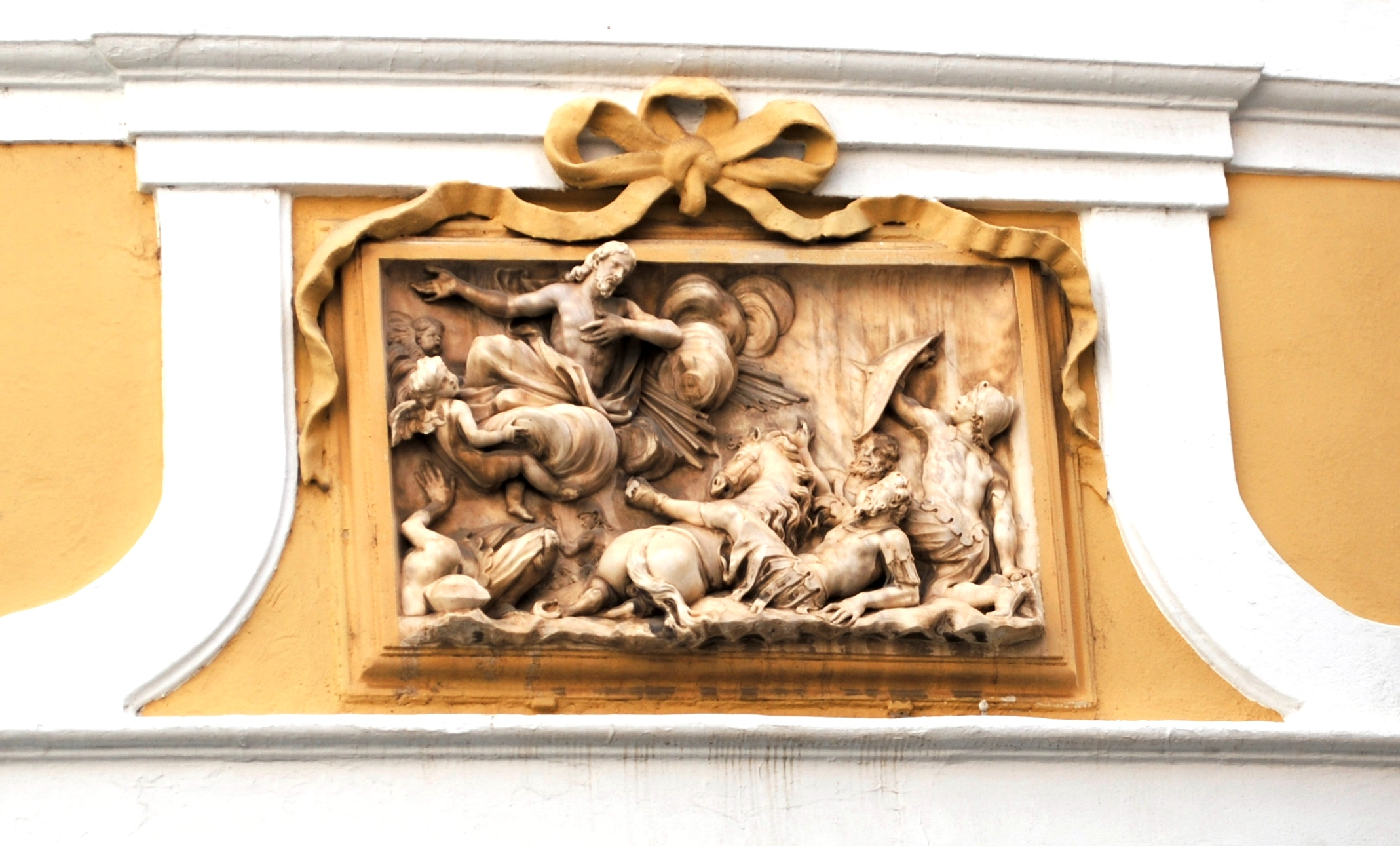 Iglesia de la Conversión de San Pablo, detalle, Cádiz